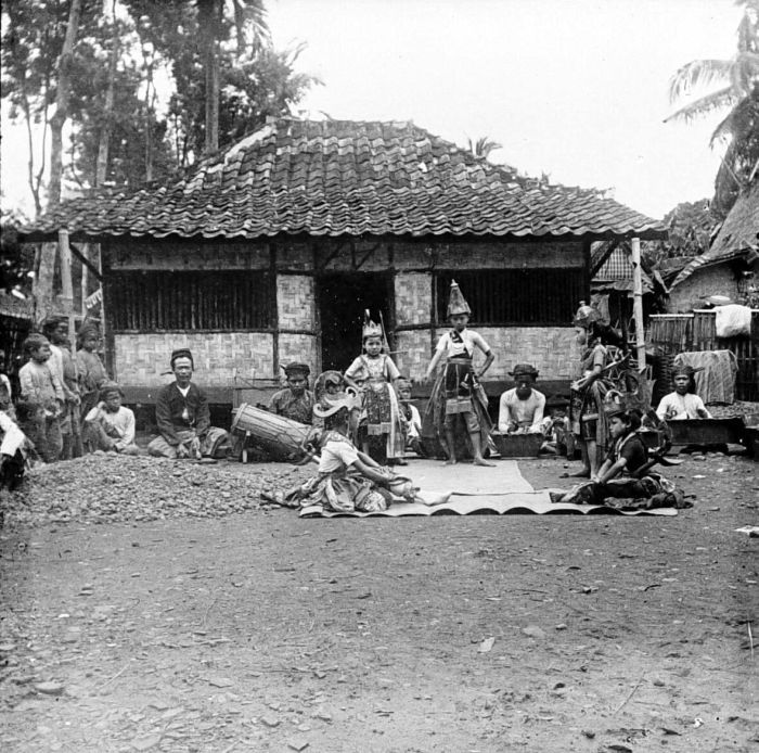 Repronegatief. Soendanese dansen in de Preanger